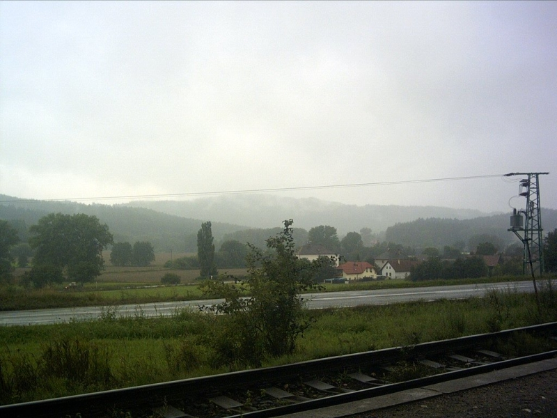 Pohled na obec Jinolice z tamejsi zeleznicni stanice.